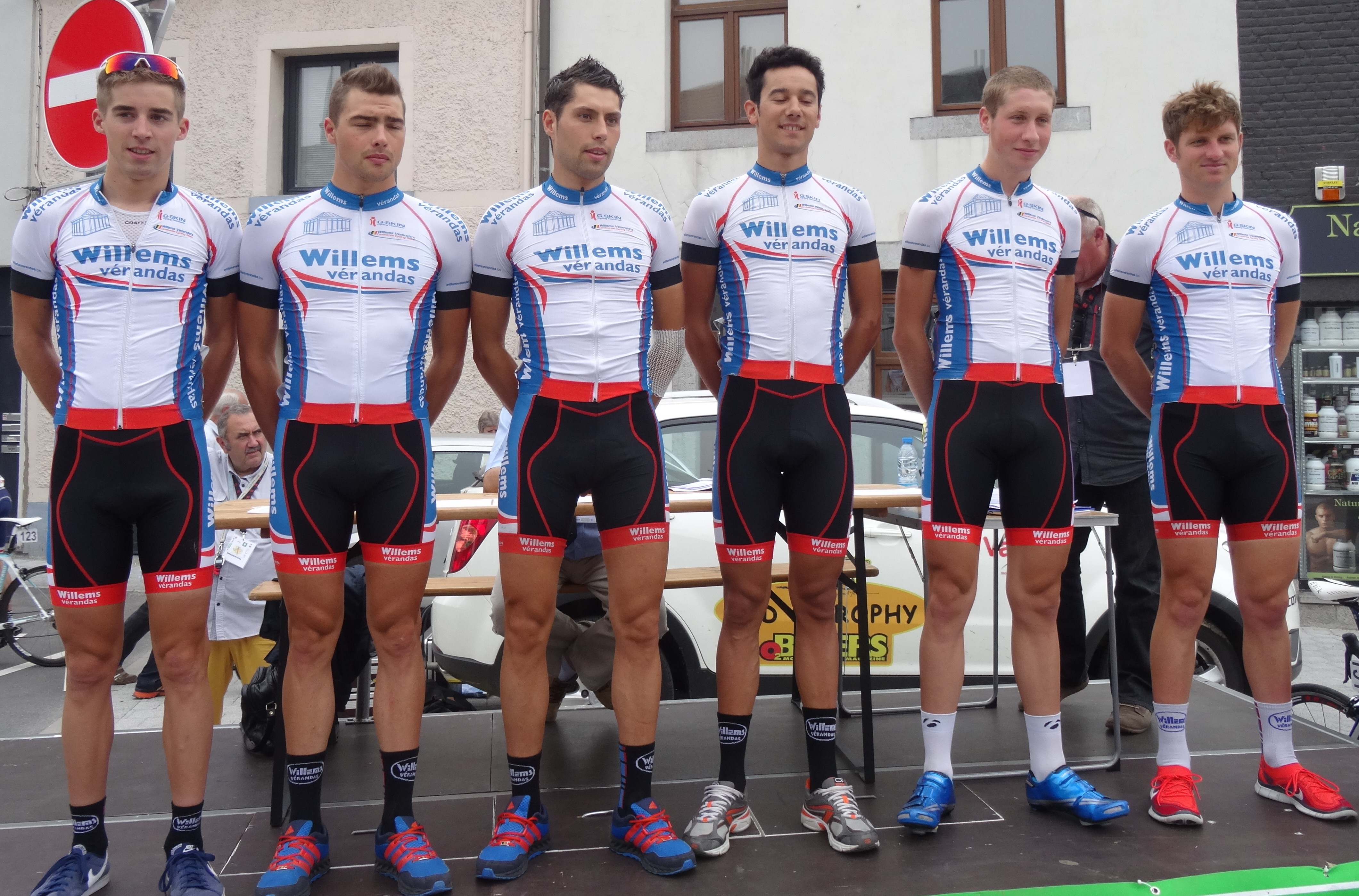 Reportage photographique réalisé le mercredi 6 août à l'occasion du départ de la première étape du Tour de la province de Namur 2014 à Jambes (Namur), Belgique.